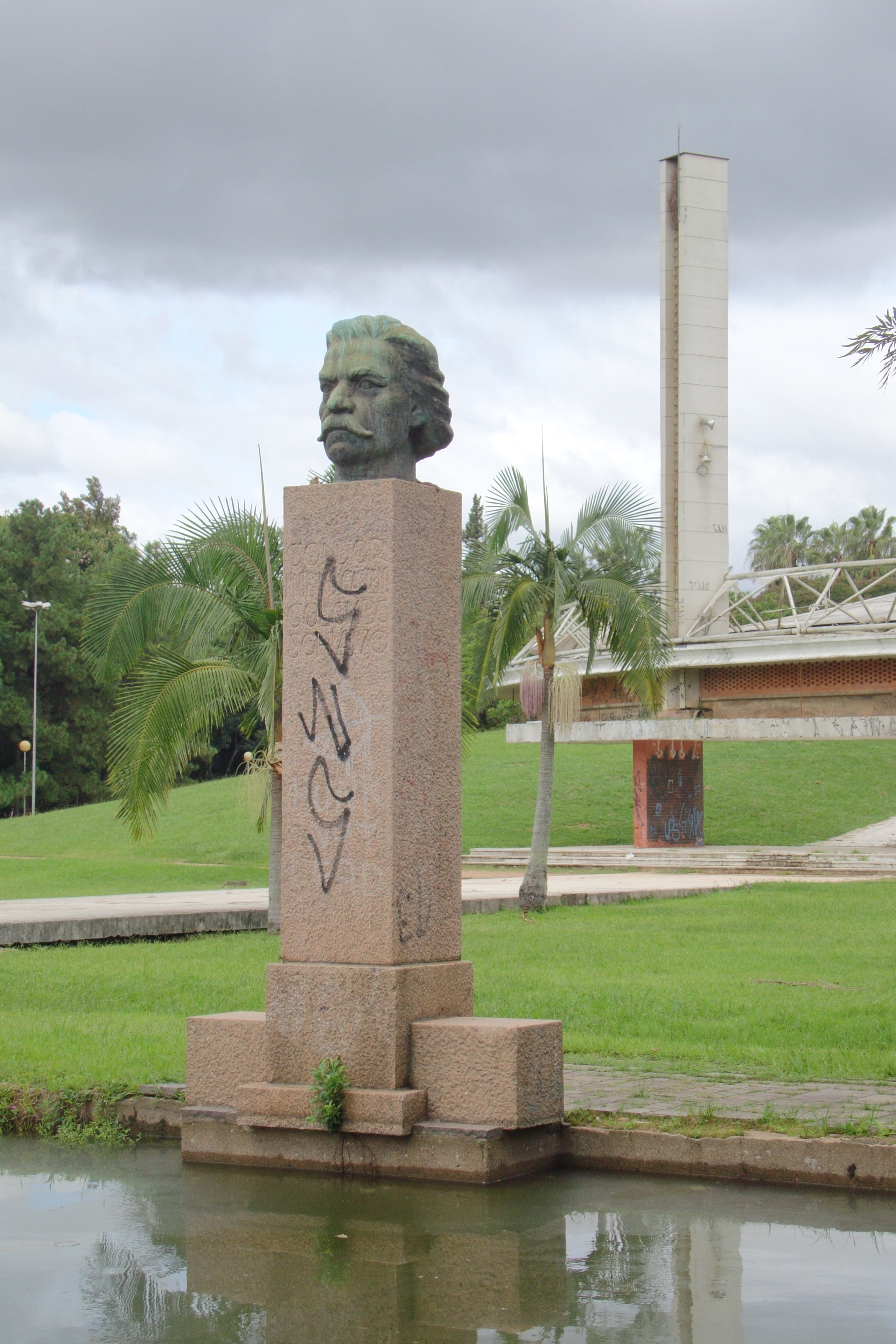 Busto de Carlos Gomes em frente ao Auditório Araújo Viana em Porto Alegre.